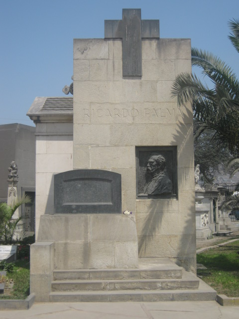 Ricardo Palma (Tumba)